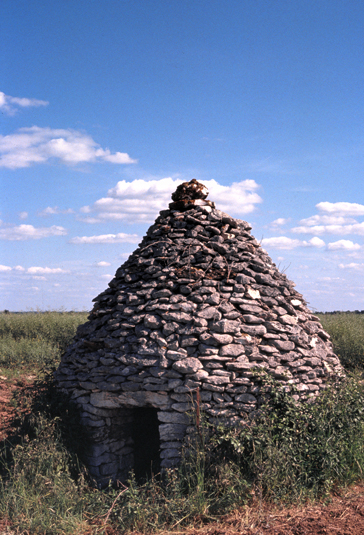 Cabane en pierre sèche ou loge située à Châteauneuf-sur-Cher (Cher). Photo de Christian Lassure.